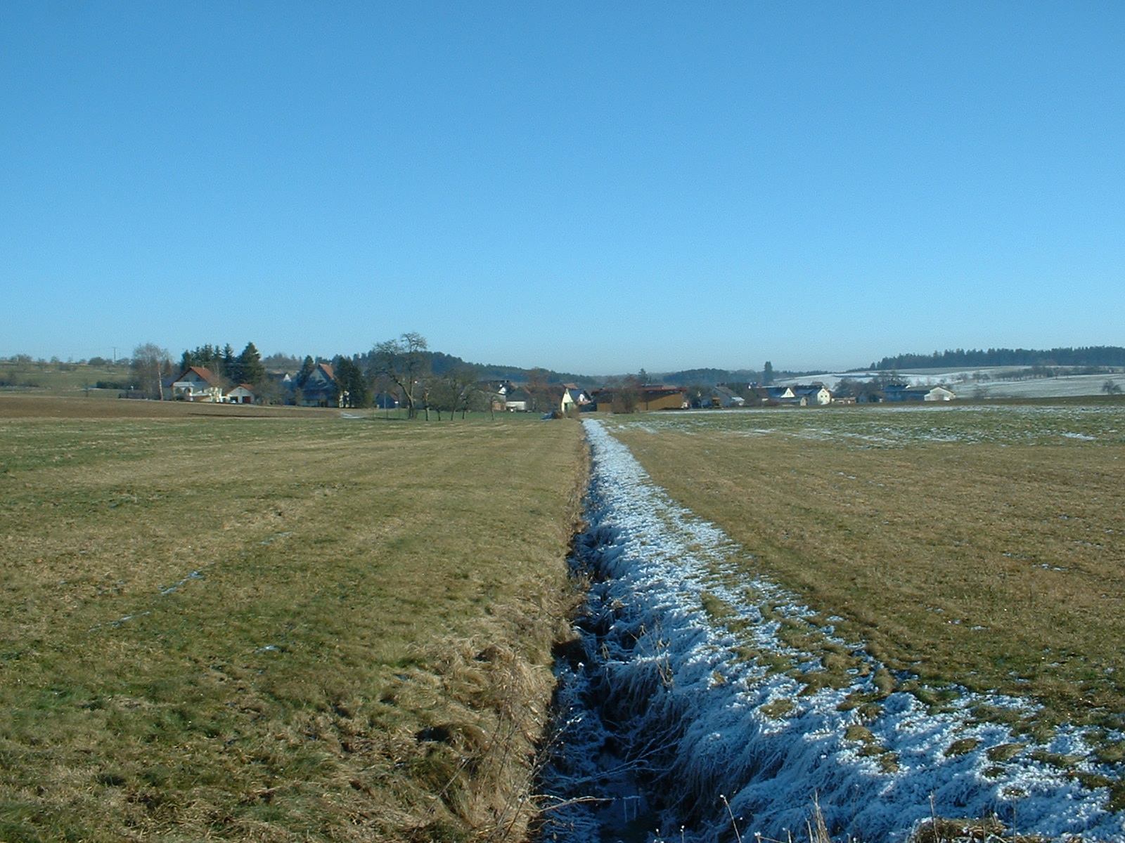 Der Dorfbach kurz unterhalb der Quelle mit Blick auf Altheim, Gemeinde Leibertingen, DE-BW